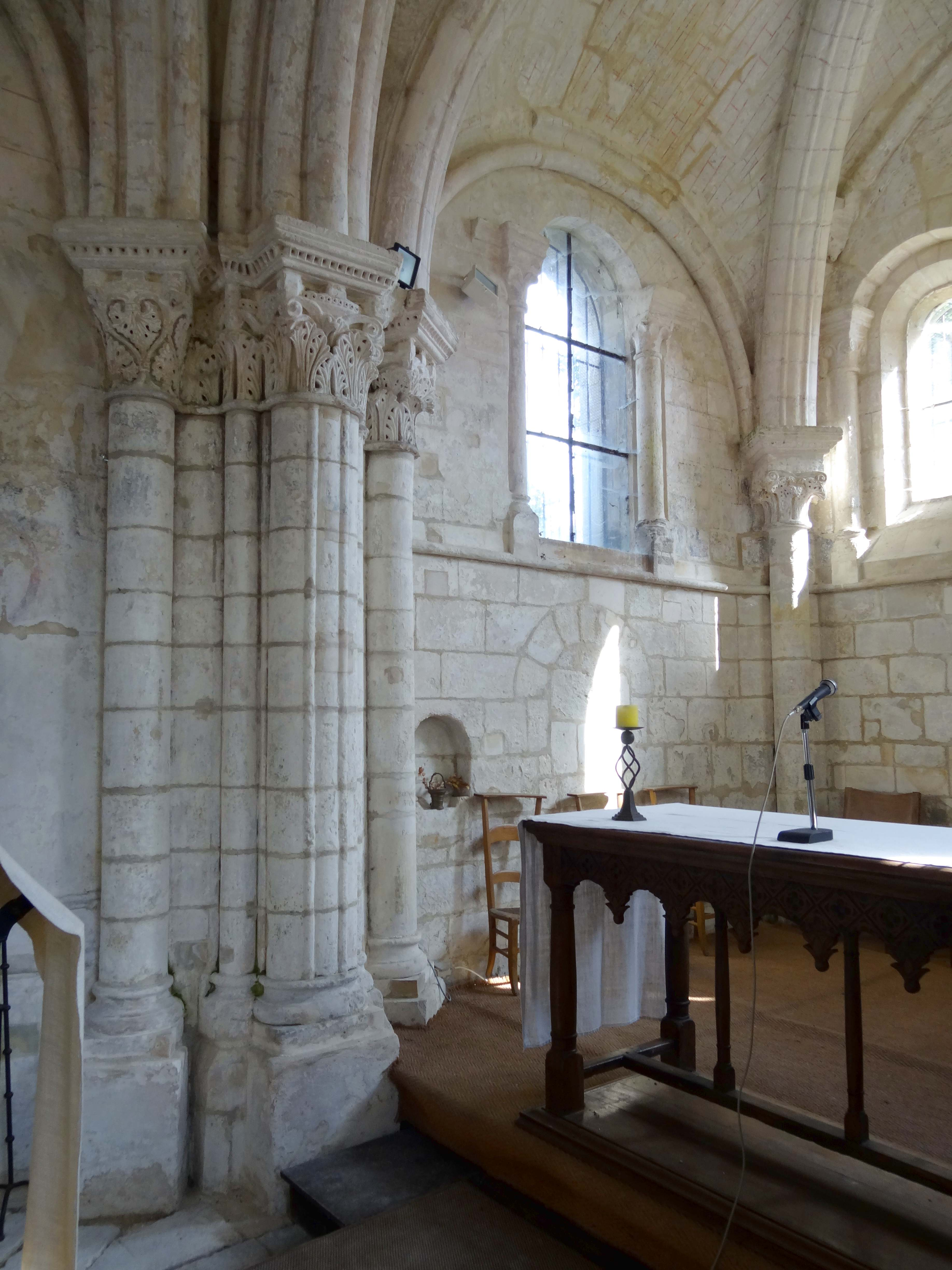 Intérieur de l'église - voir titre.